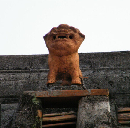 中文（中国大陆）: 广东省汕头市达濠老厝厝顶的风狮